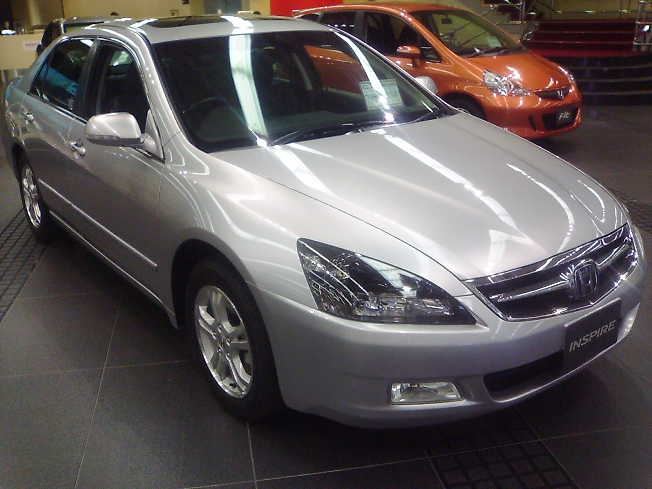 JDM Honda Inspire